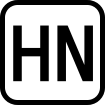 阪堺電気軌道の路線記号。GD-高速道路ゴシックJA-OTFを使用して作成